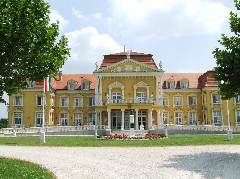 Princes Palace - kastély, Dunakiliti. Saját kép.